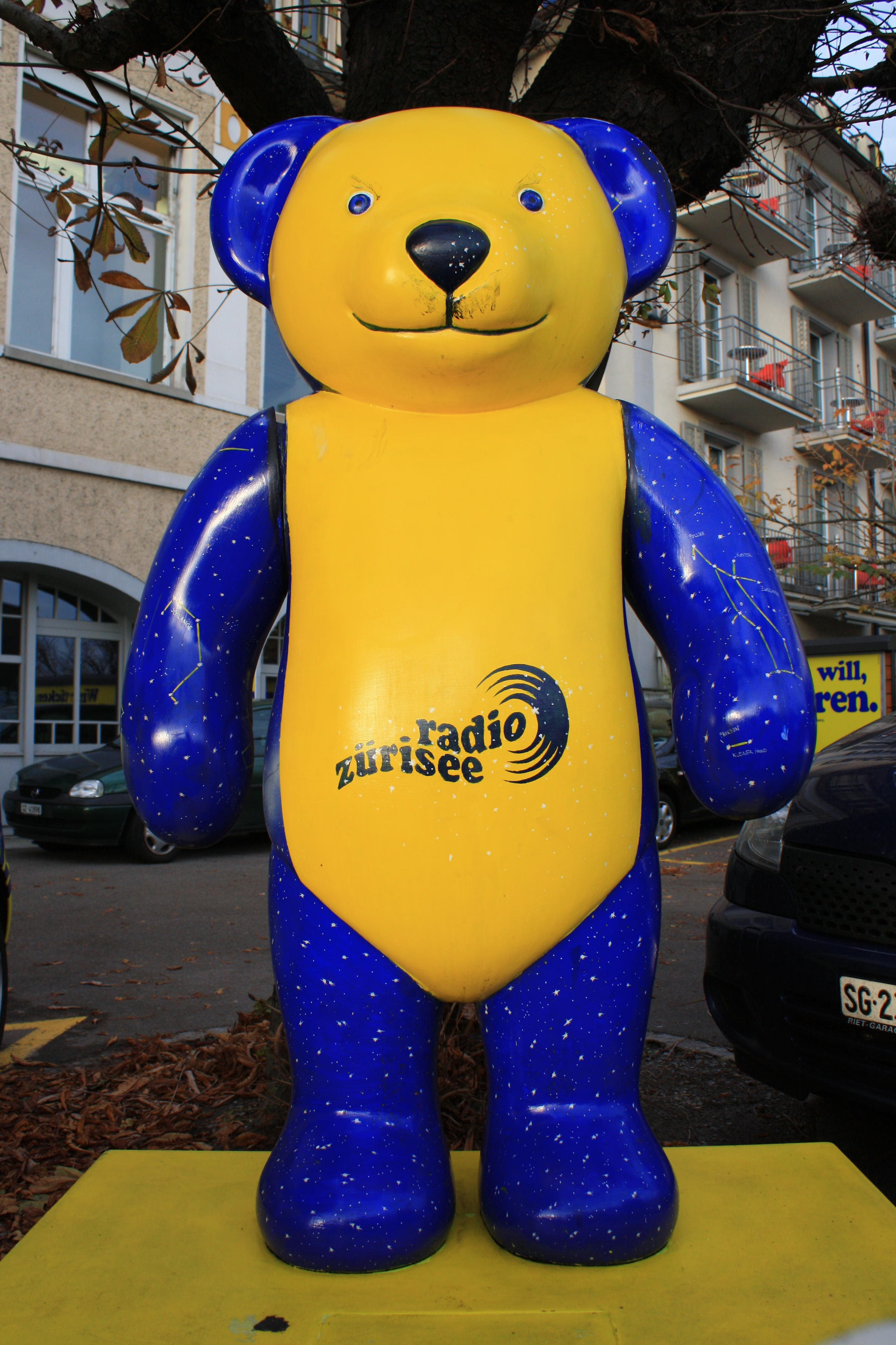 Radio Zürisee's Züri-Bär at Untere Bahnhofstrasse in Rapperswil